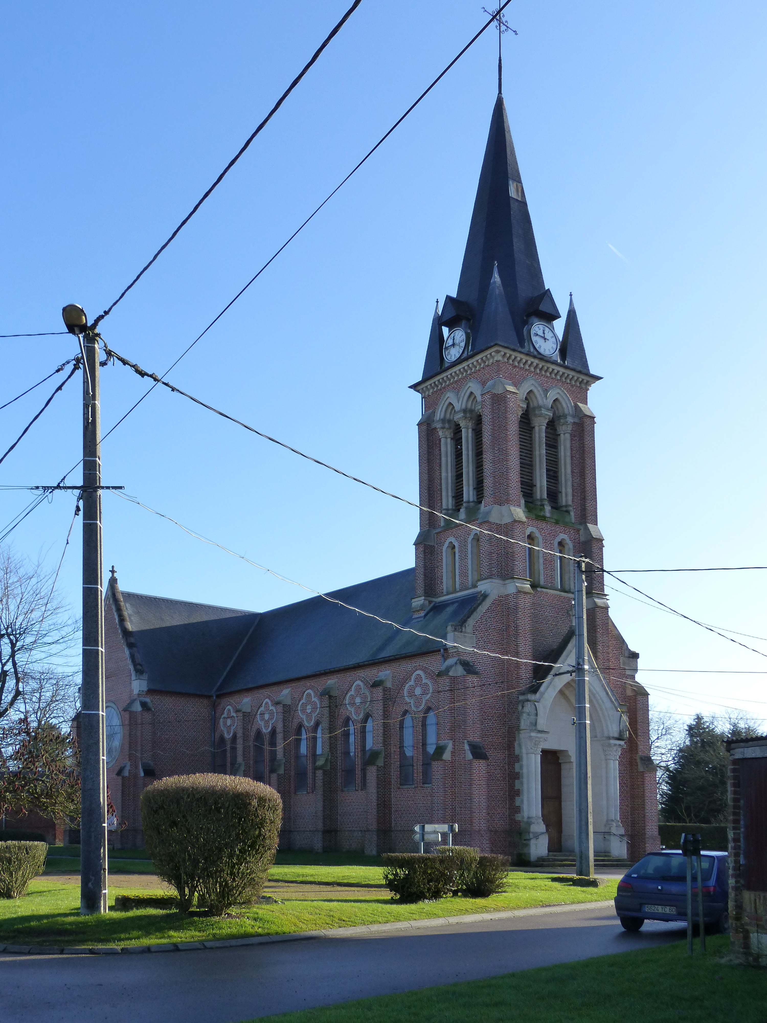 Eglise Sainte-Marguerite de Rotangy